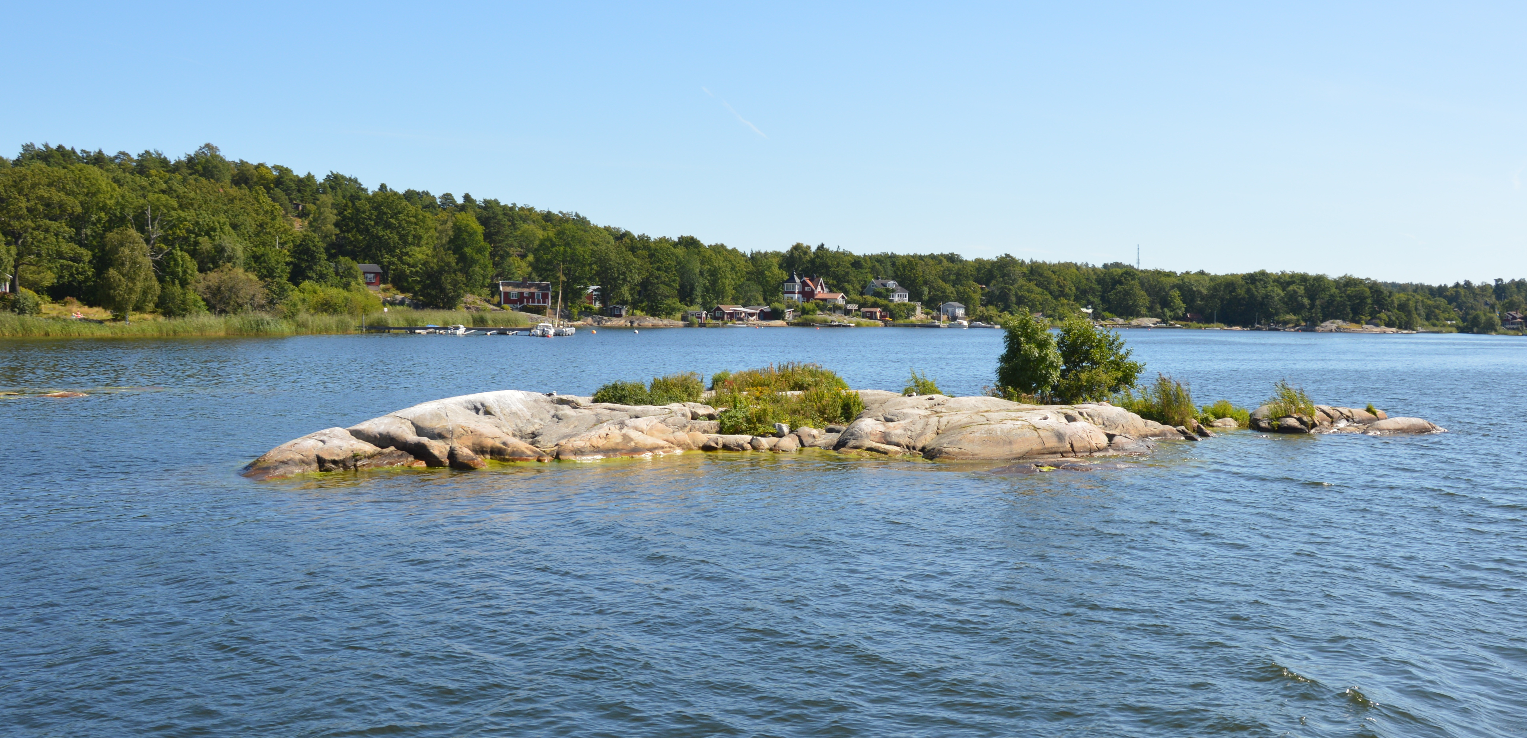 Stinasgrundet